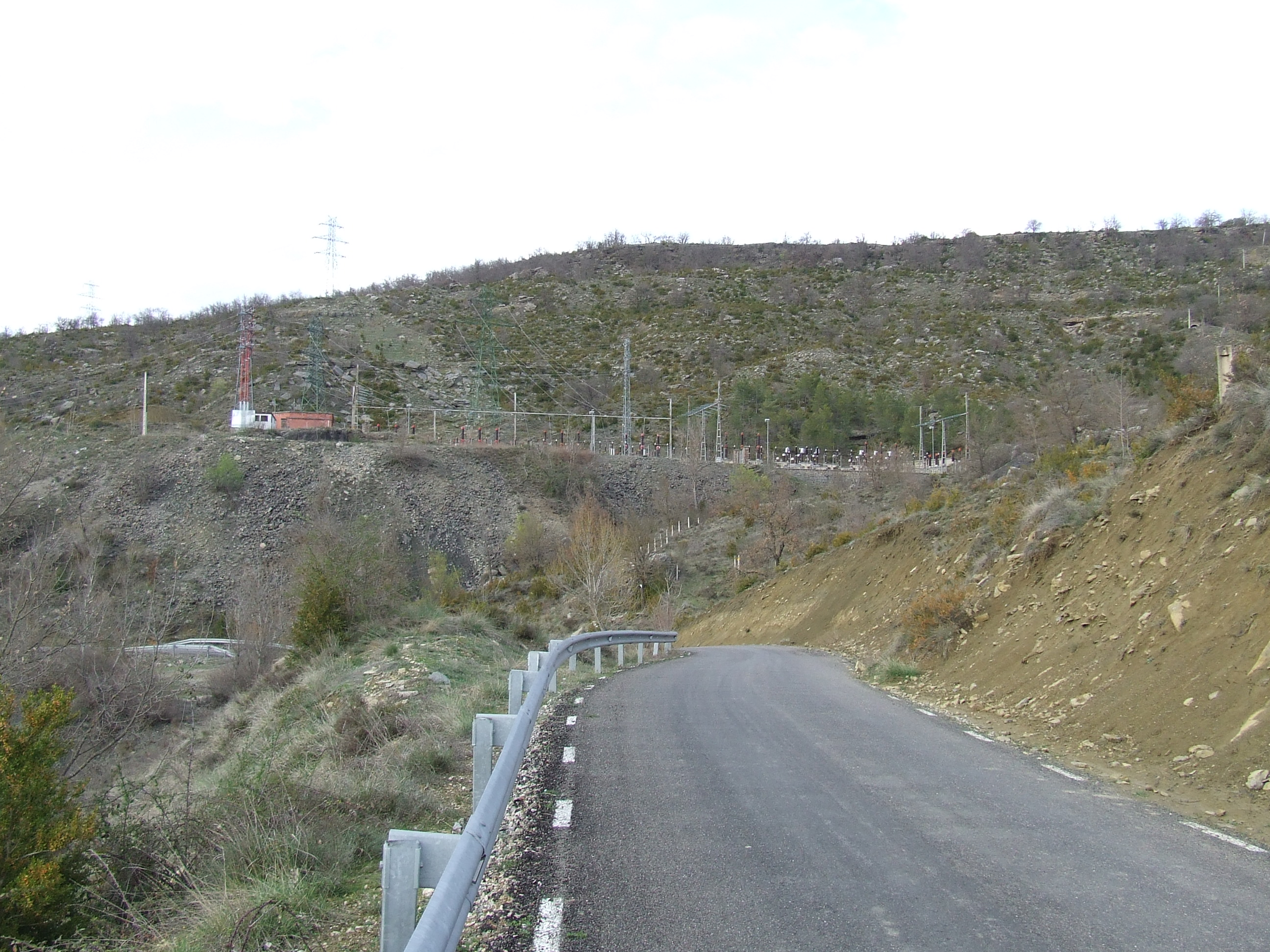 Central elèctrica del Pont de Montanyana, a Mont-rebei (Sant Esteve de la Sarga, Pallars Jussà)